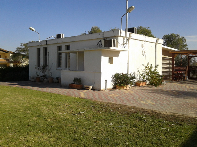 בית הכנסת במושב תלמי אליהו, צולם בדצמבר 2013